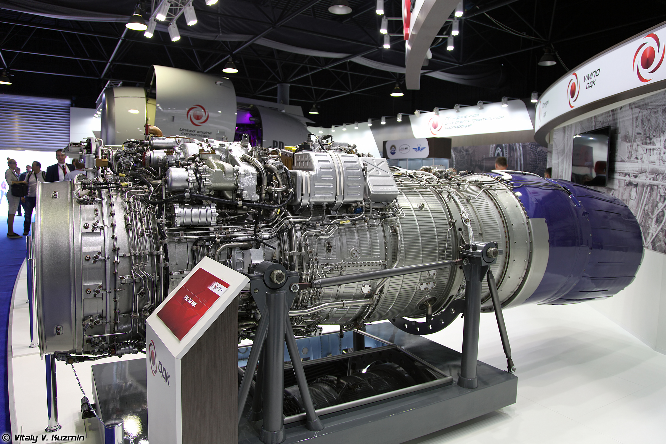 Турбореактивный двигатель РД-33МК (RD-33MK engine)